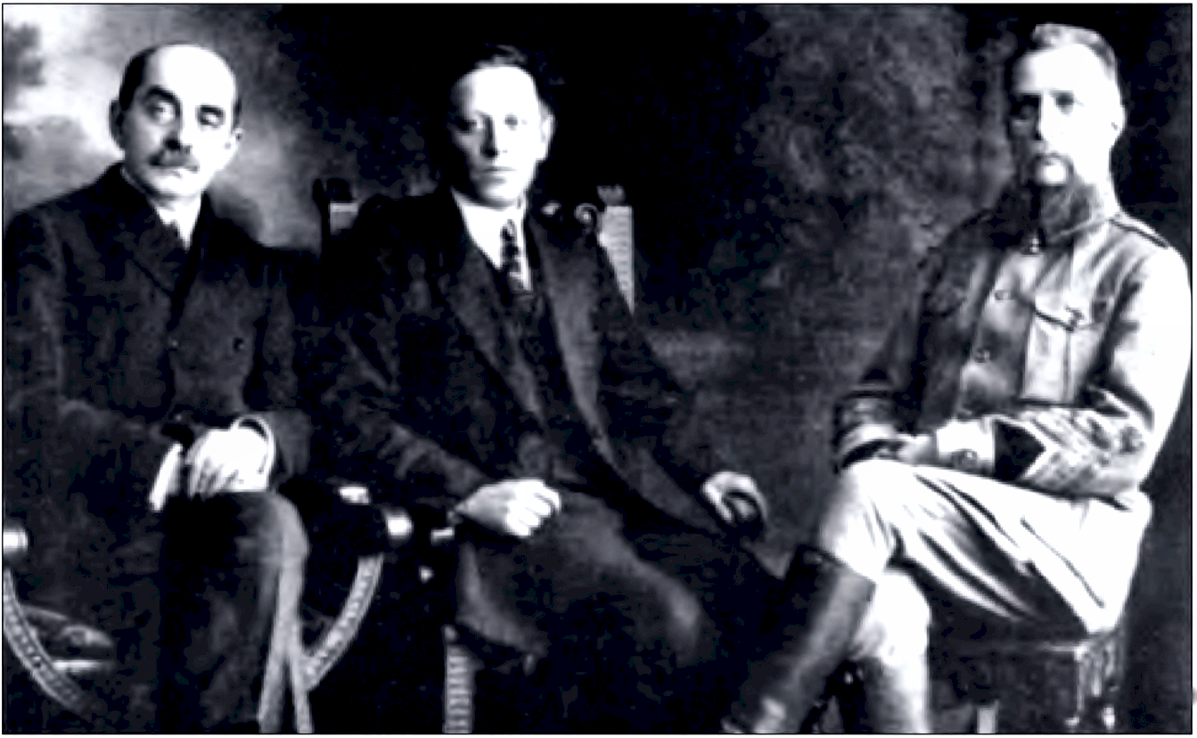 Nikolaus Wassilko als ukrainischer Minister mit Sondervollmacht 1919 (links im Bild)